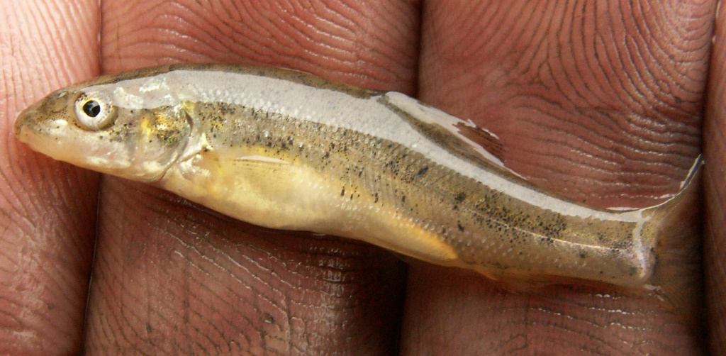 Juvenile barbel Barbus barbus'from the river Waal (Lower Rhine)at Tiel Gelderland, the Netherlands. Juveniel barbeeltje uit monding nevengeul bij Tiel